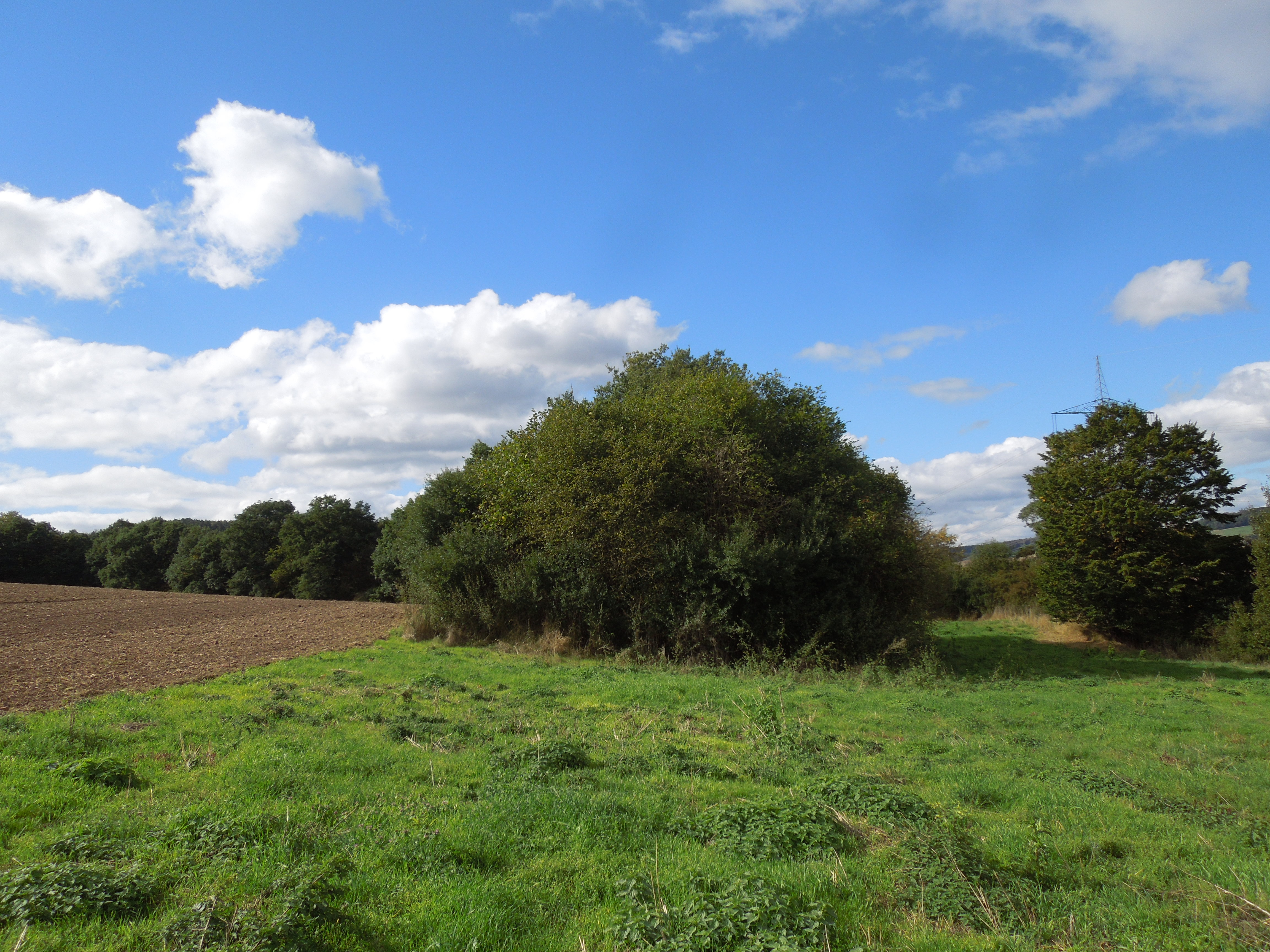 Die Busch- und Gehölzgruppe um die Reste der Margarethenkirche bei Kerstenhausen, Anblick von Osten